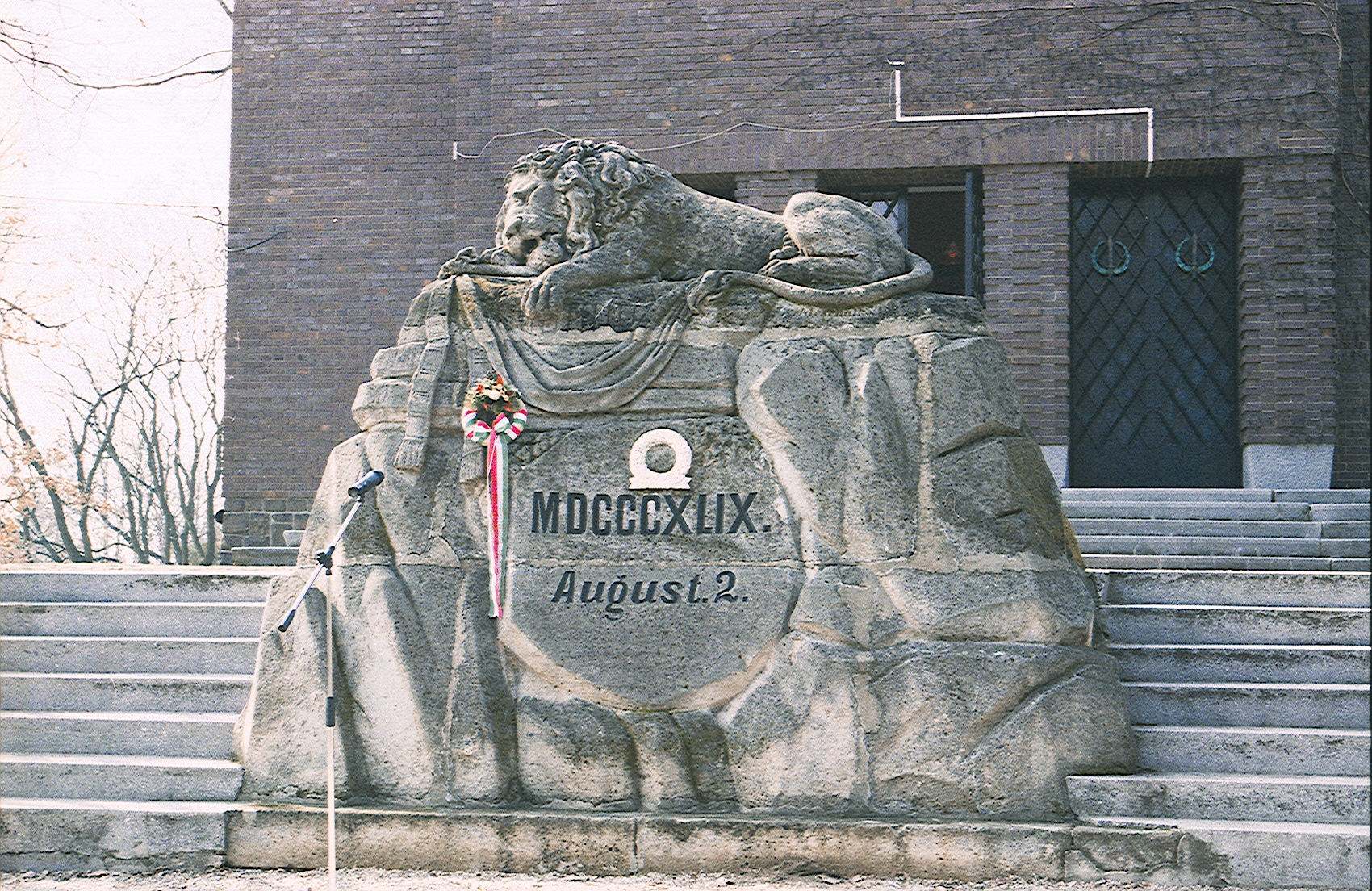 Haldokló oroszlán. Debrecen, Hősök temetője. (Az 1849 augusztus 2-ai debreceni ütközet emlékére)